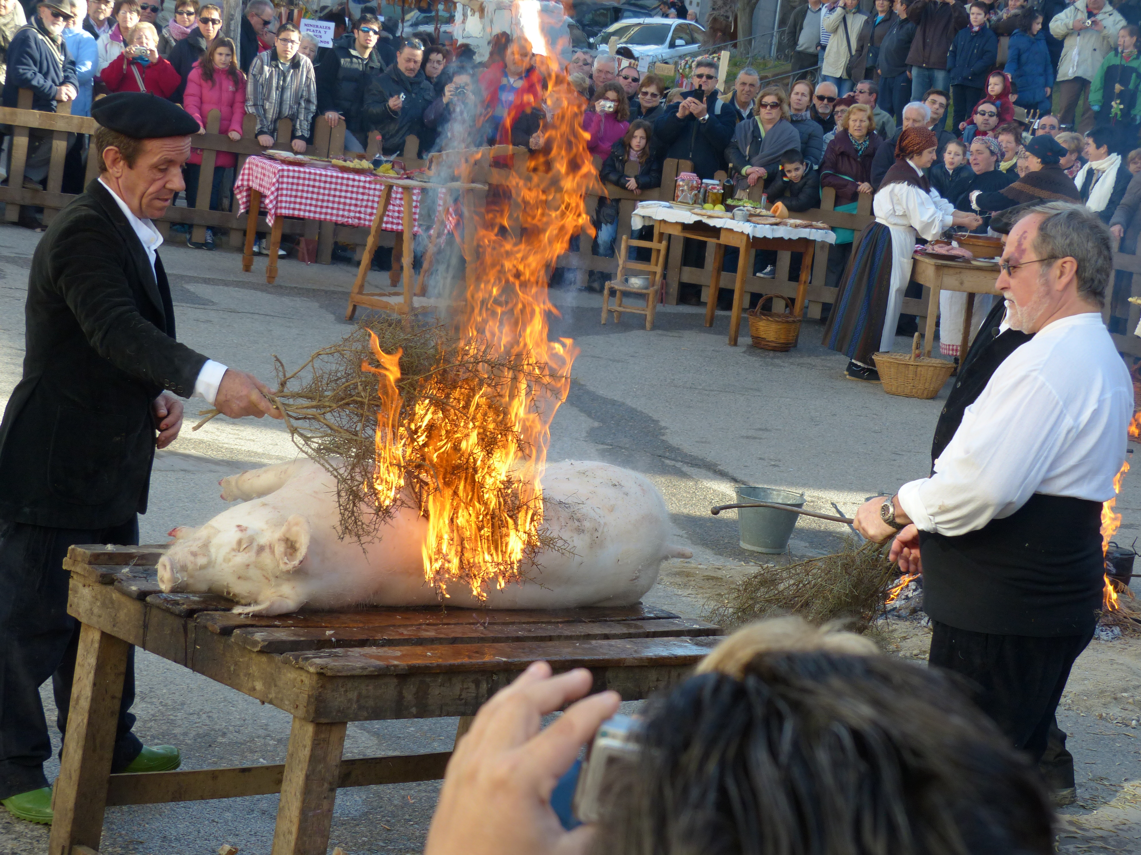 Albelda, provincia de Huesca, España.